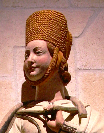 Alžběta Štaufská